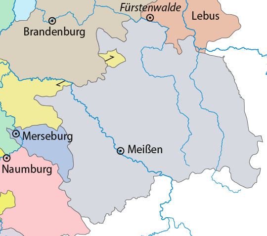 Bistum Meißen vor der Reformation